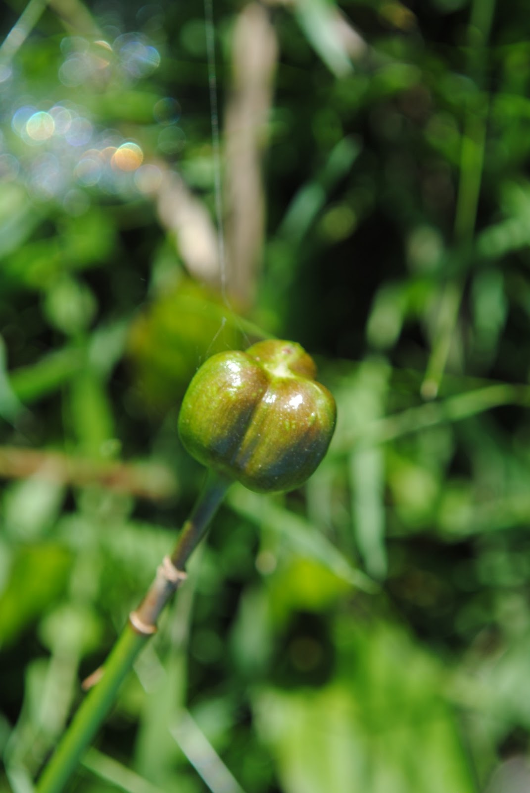 Zephyranthes candida. Amaryllidaceae. Fotos tomadas en bañados al margen del Río Negro en Palmar, departamento de Soriano, Uruguay.